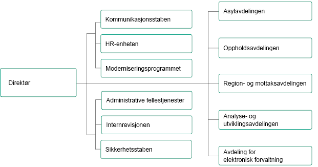 Organisasjonskart for Utlendingsdirektoratet, 2020